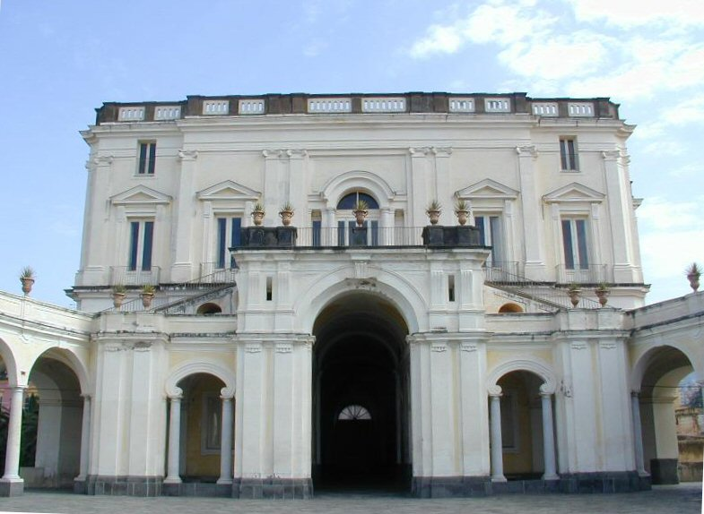 Ercolano (Napoli): Villa Campolieto, facciata verso il porticato ellittico